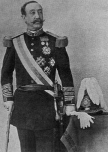 Depicted person: Manuel Macías y Casado – Spanish general and colonial governor